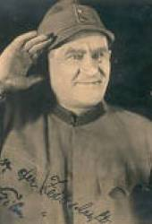 Herec Karel Noll